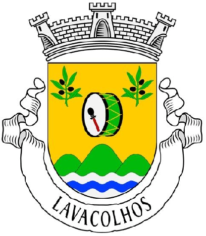 Brasão de Lavacolhos